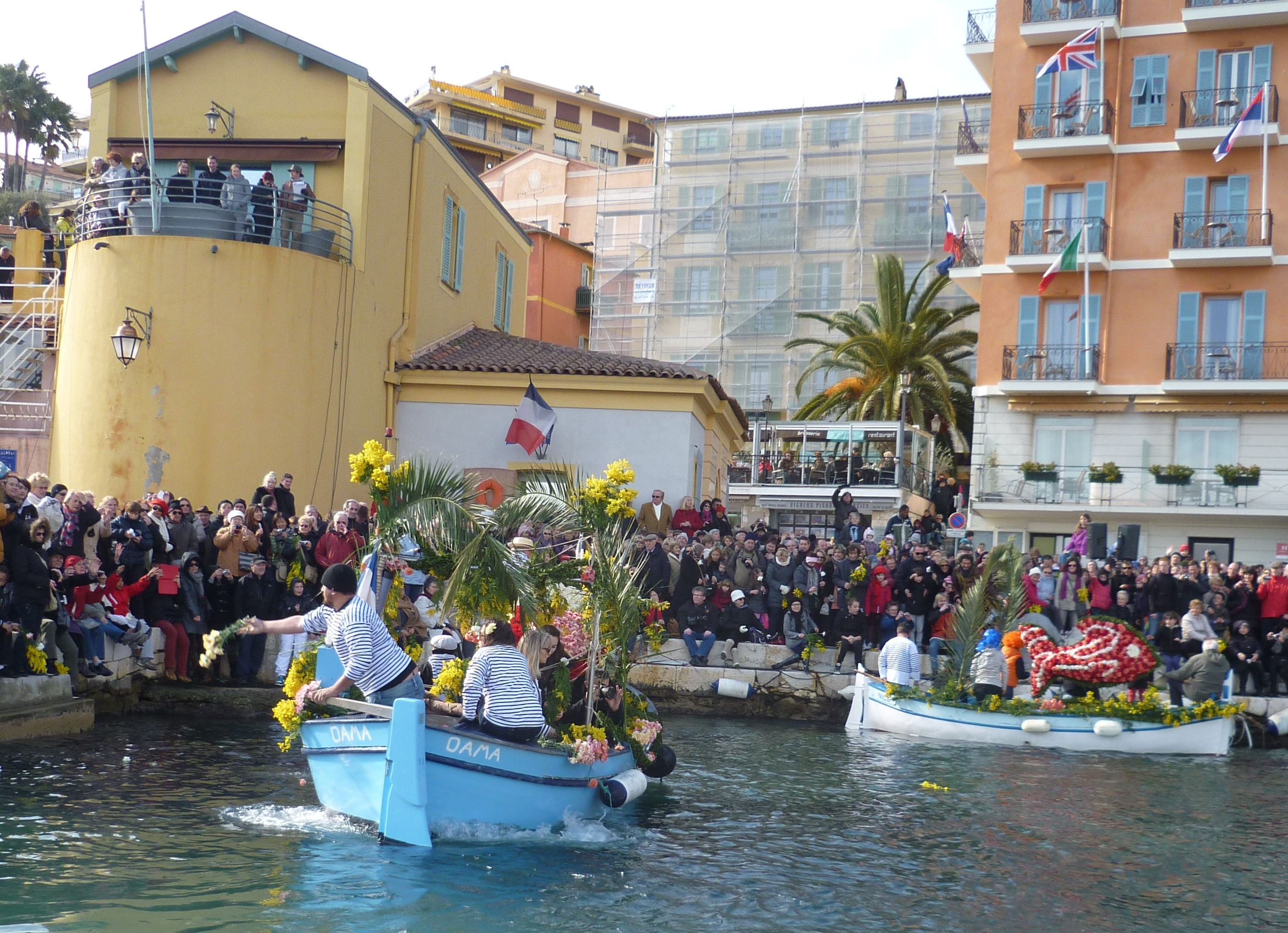 Combat Naval Fleuri de Villefranche-sur-Mer